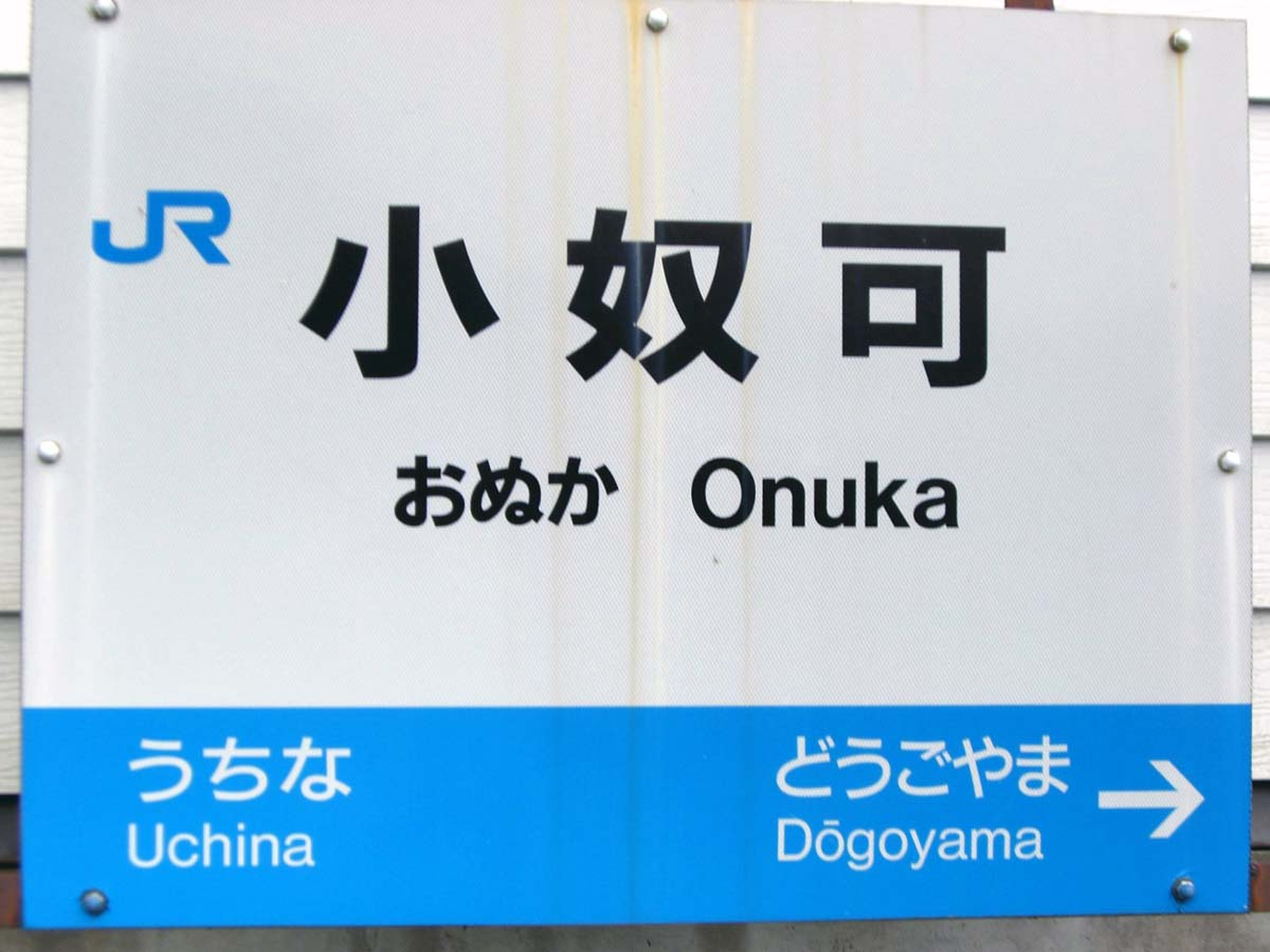 撮影地、撮影場所…JR芸備線、小奴可駅の駅名票。撮影年月日…2006年9月17日